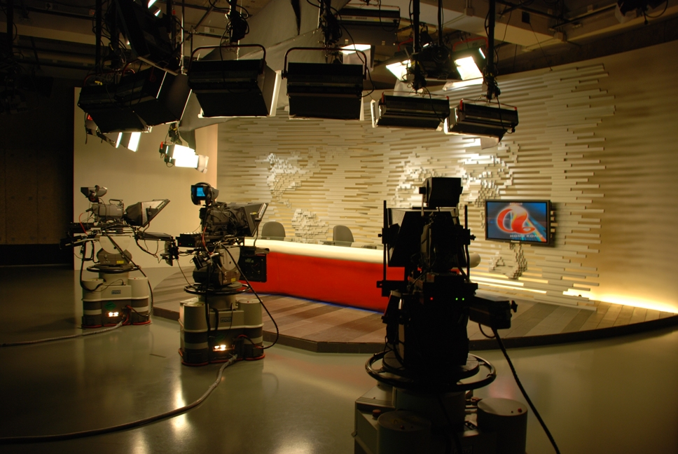 中文（香港）: 亞洲電視新聞錄影廠。